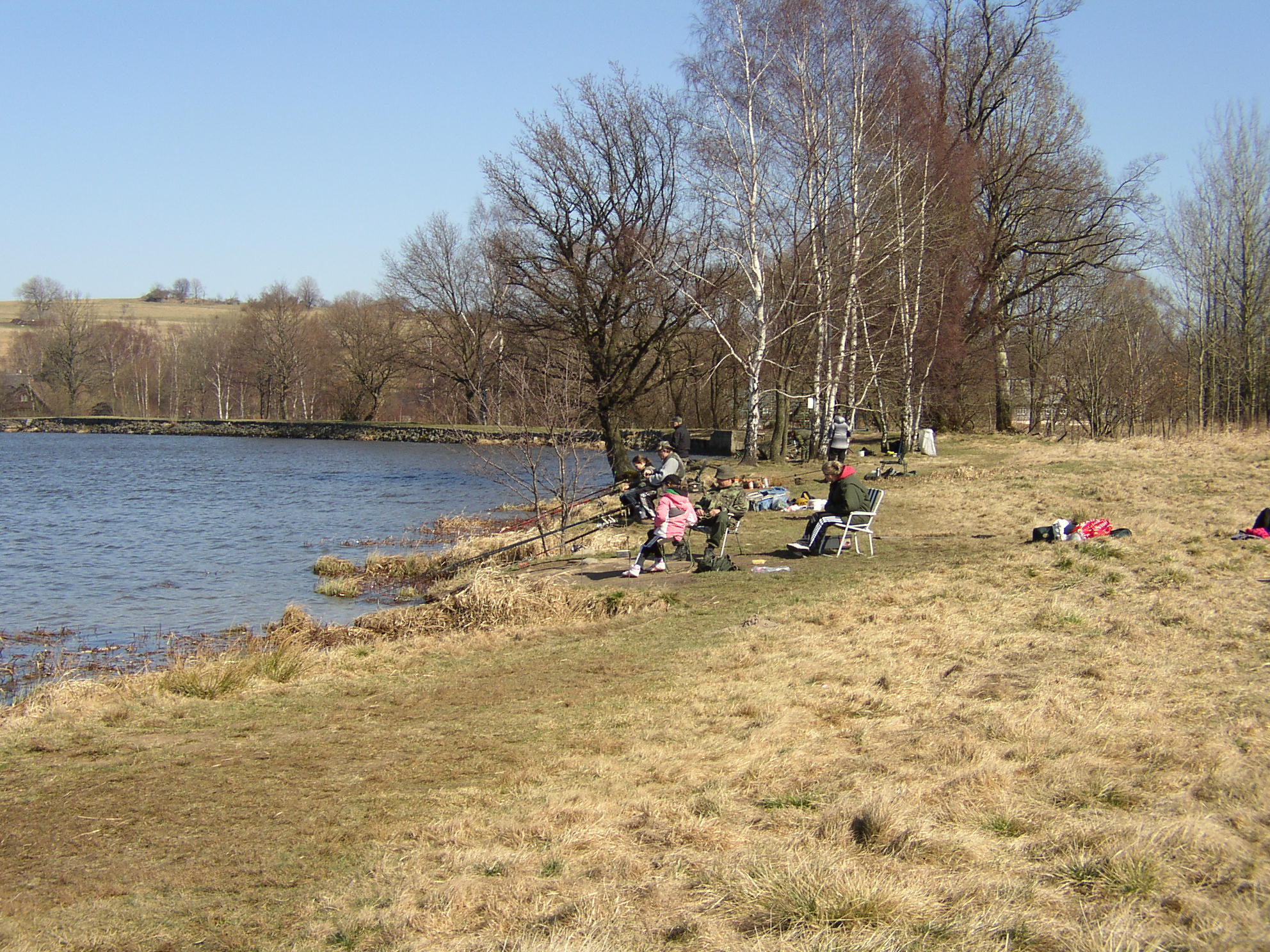 Velký rybník, okres Děčín, Ústecký kraj, Česká republika. Rybáři na břehu rybníka